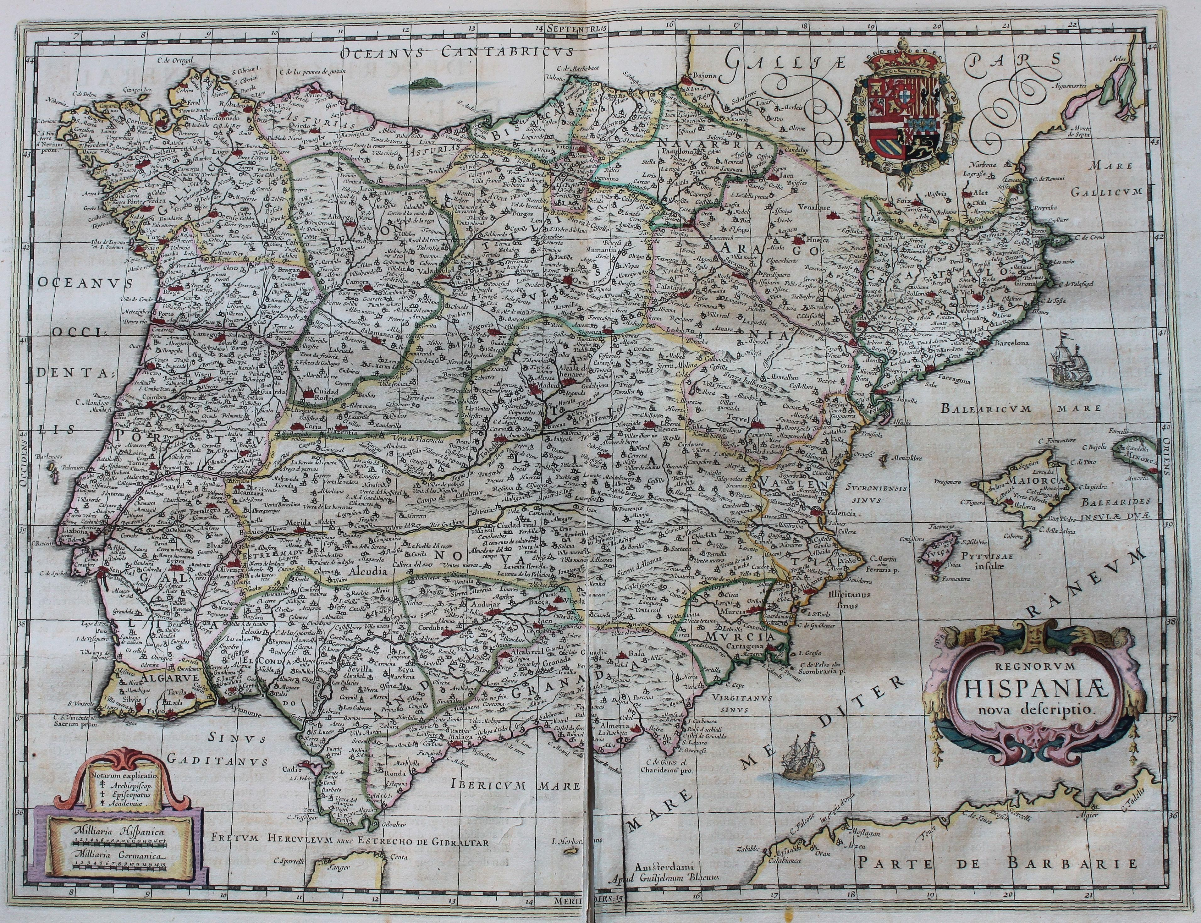 Descripción bibliográfica: Geographia Blaviana. - [Amsterdam : Juan Blaeu, 1659] . - [32], VI, 96 p., 34 f., h. 35a, 35b, 35c, 35d, 36-44 f., 34, [2], 36-40, [2], 43-70 [i. e. 75], [1] f., [20] p. de map., [9] f. de map., [4] f. pleg. de map., [2] f. de plan., [2] f. ge grab. : |bil. ; |cFol. marca major (57 cm.) . - En la dedicatoria a Felipe IV: "Presenta ... El Atlas Universal y Cosmographico de los orbes y terrestre ... Juan Blaeu" . - Título tomado del frontispicio. -- Privilegio fechado en 1659. -Errores de pag. - Sign.: 1, *2, **3, ***-****2, a-e2, A-I2, K1, L-Z2, Aa-Dd2, 4 2, Ee-Ff2, A-I2, K1, L2, M1, N-Y2, Z5, Aa-Dd2, Ee1, A-D2, E-F1, G-I2, K-L1, M-O2, P1, Q-Z2, Aa-Bb2, Cc1, Dd3, Ff-Zz2, Aaa-Bbb2, . - Frontispicio grab. col. -- Incluye un total de 49 il. entre map., plan. i grab. Materia: Atlas - Obras anteriores a 1800 Impresor: Blaeu, Joan, 1596-1673, imp. Lugar de impresión: Holanda. Amsterdam Localización: Vea la ilustración en su contexto Visite también la exposición "Cartografía histórica en la Biblioteca de la Universidad de Sevilla"